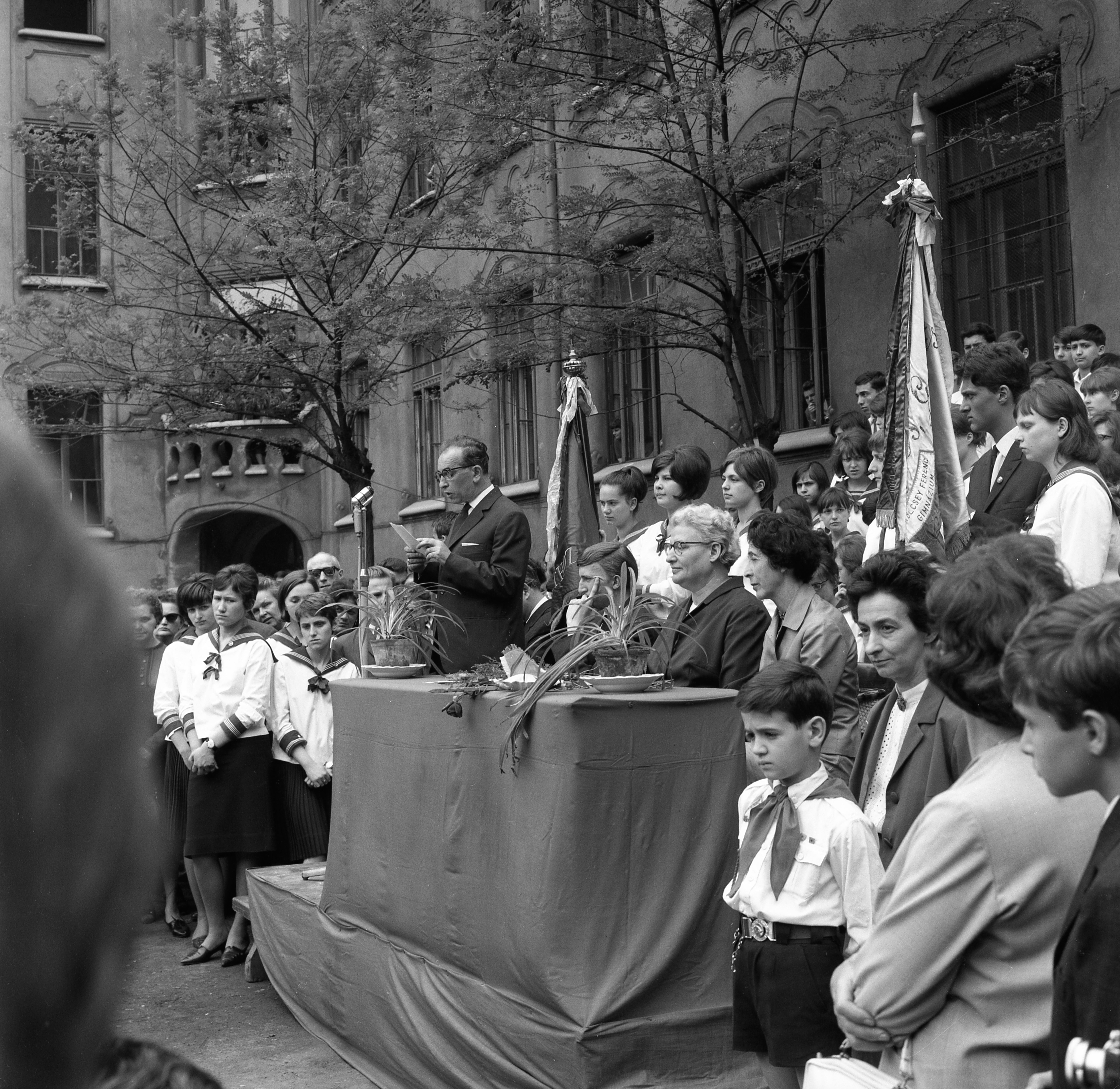 Munkácsy Mihály utca 26. Kölcsey Ferenc Gimnázium, ballagás. Location: Hungary, Budapest VI. Tags: Budapest, speech, pioneer Title: Munkácsy Mihály utca 26. Kölcsey Ferenc Gimnázium, ballagás.